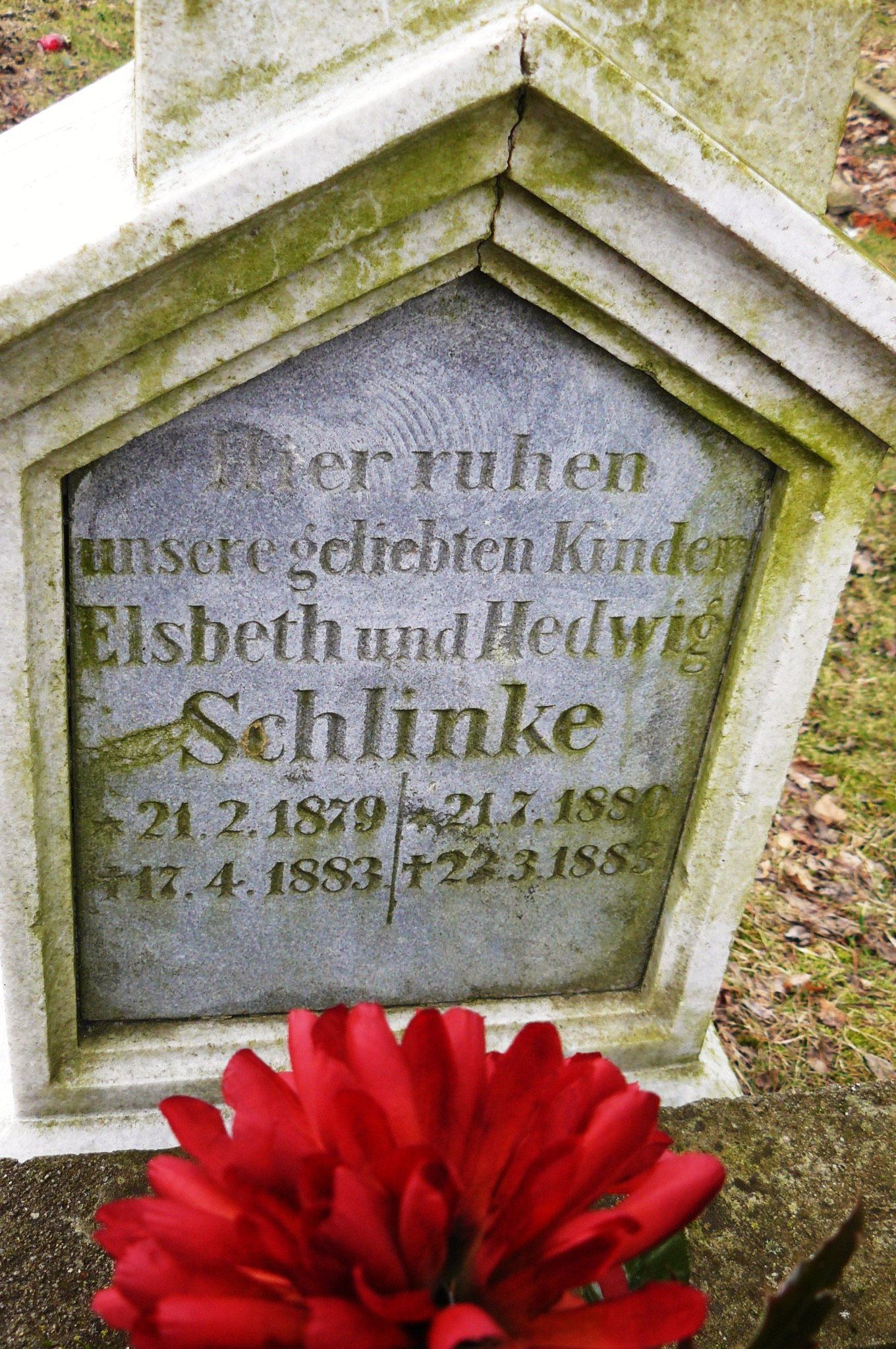 Cmentarz ewangelicki w Popowie, obecnie lapidarium.